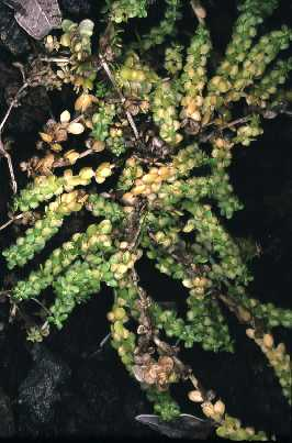 Valantia calva, Sicilian botanical endemisms